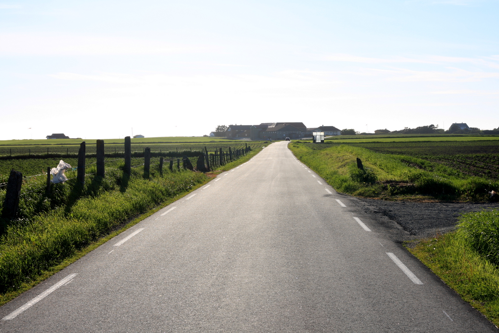 Fylkesvei 245 Seleveien